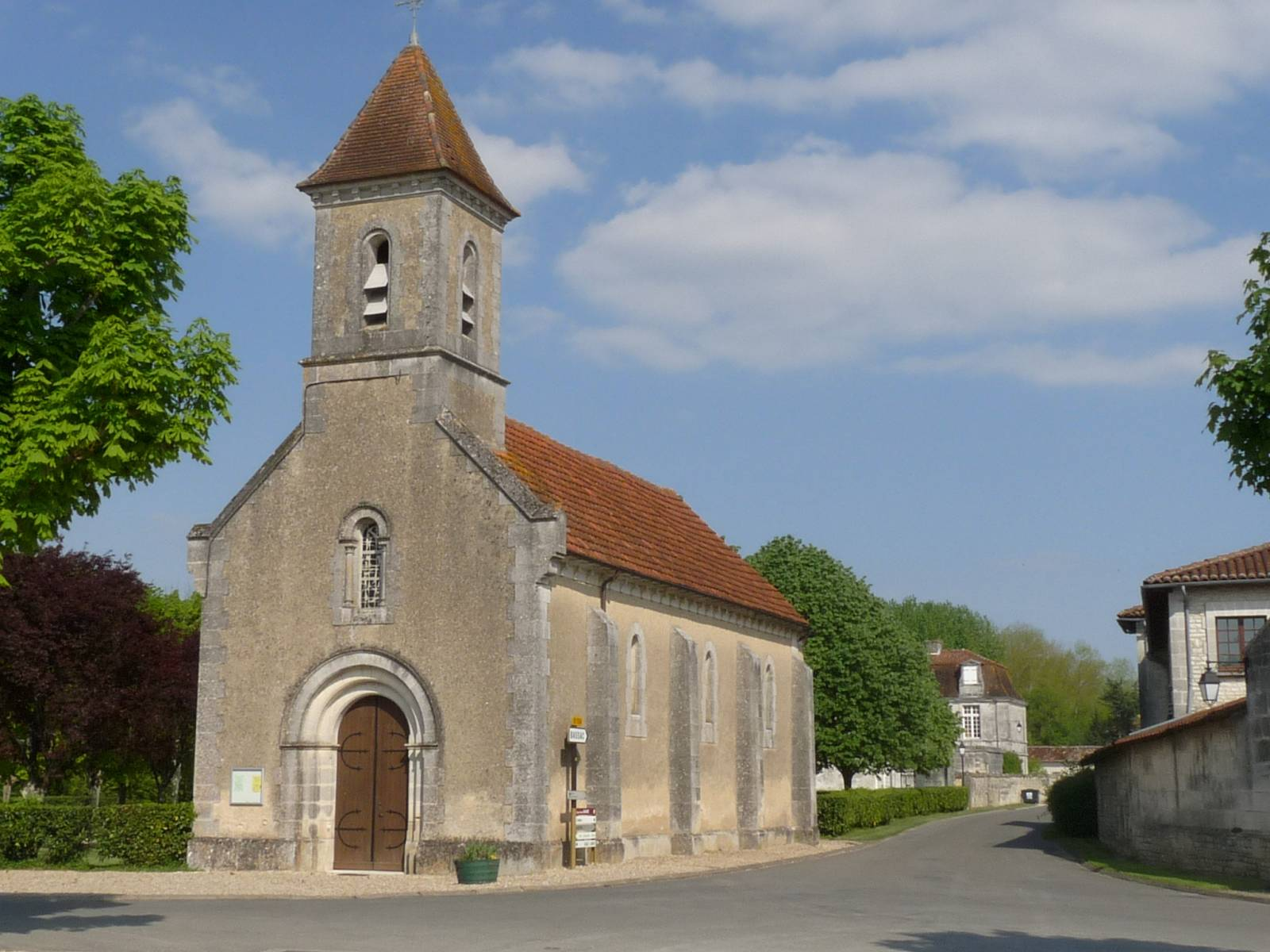 église de Gondeville, Charente, France